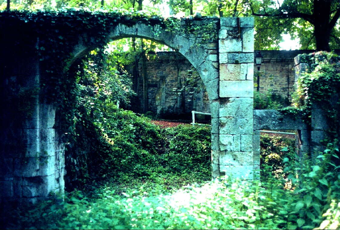 Porte Dijonnaise à Châtillon-sur-Seine (Côte-d'Or)